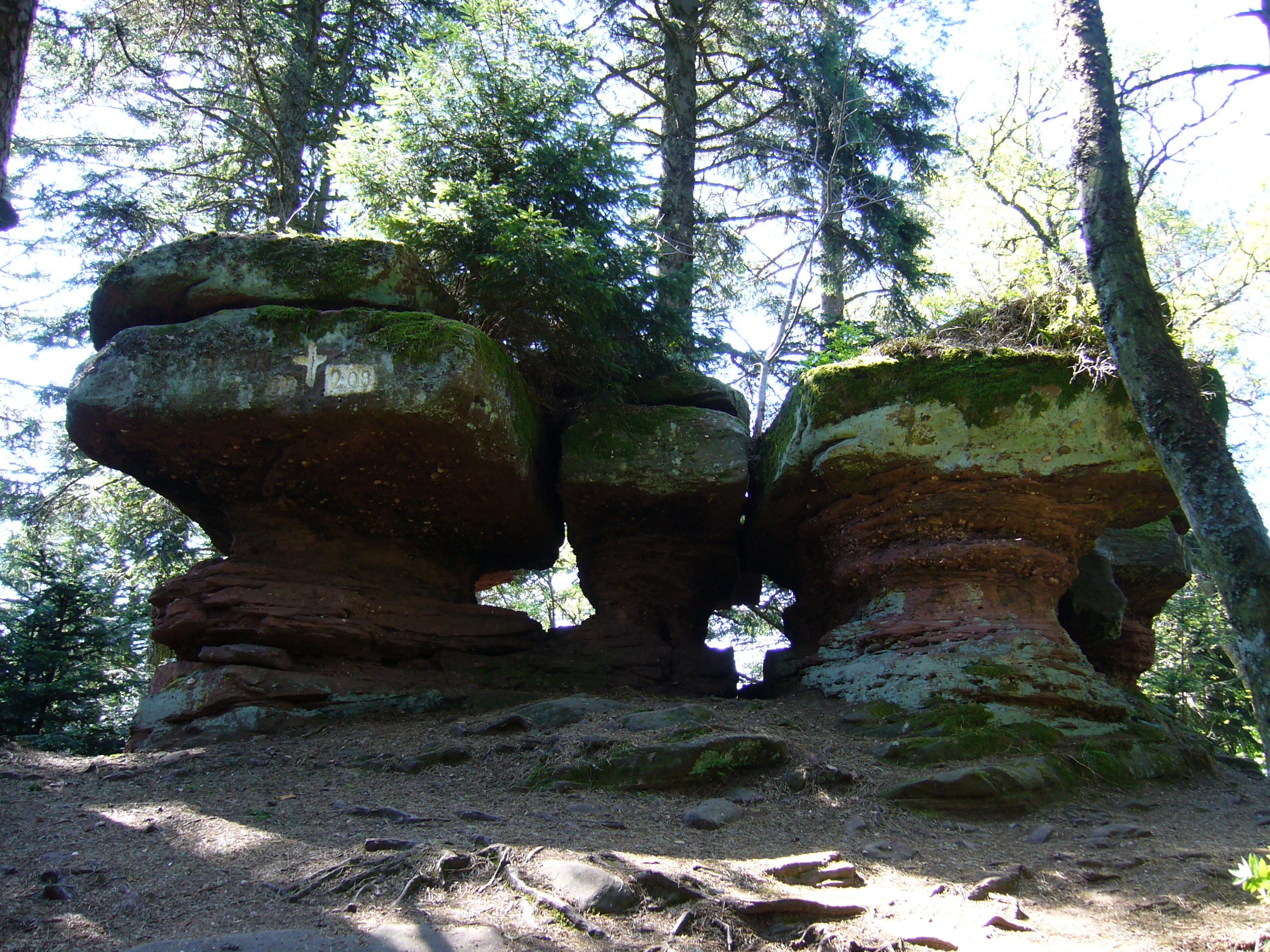 Taennchel 168.JPG